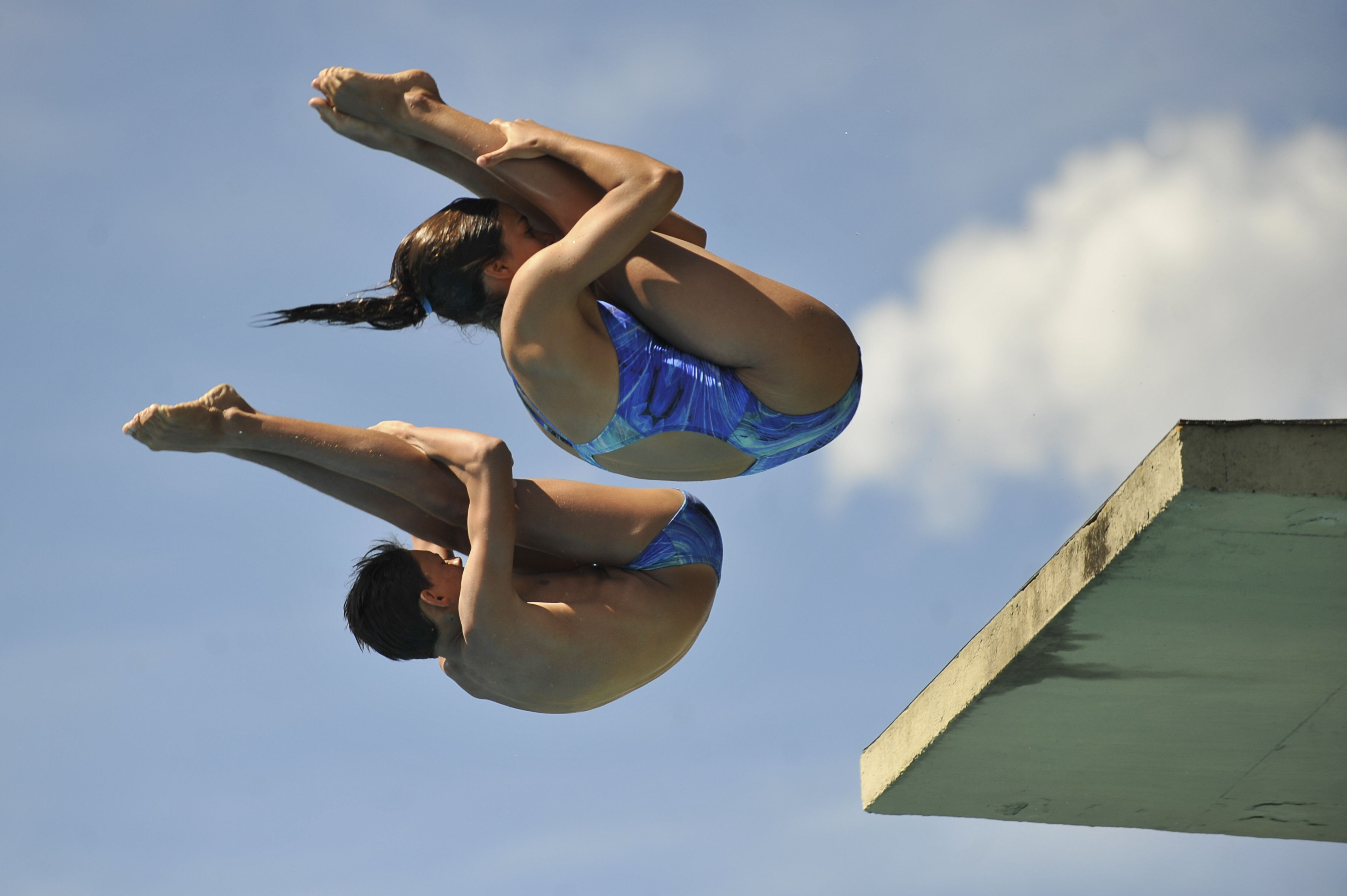 Troféu Brasil de Saltos Ornamentais, na UnB.